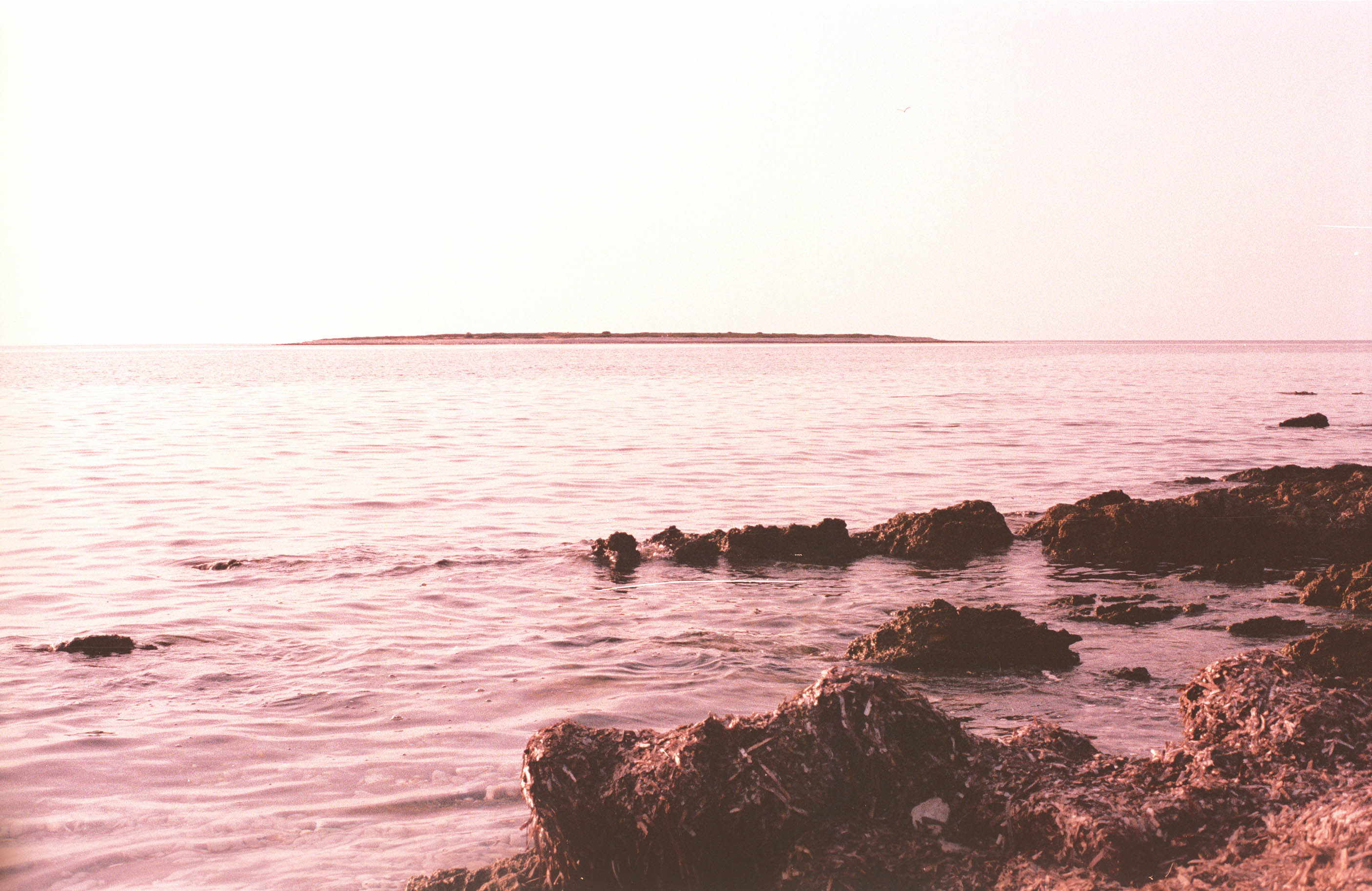 Pogled na Mežanj sa plaže Veli Žal